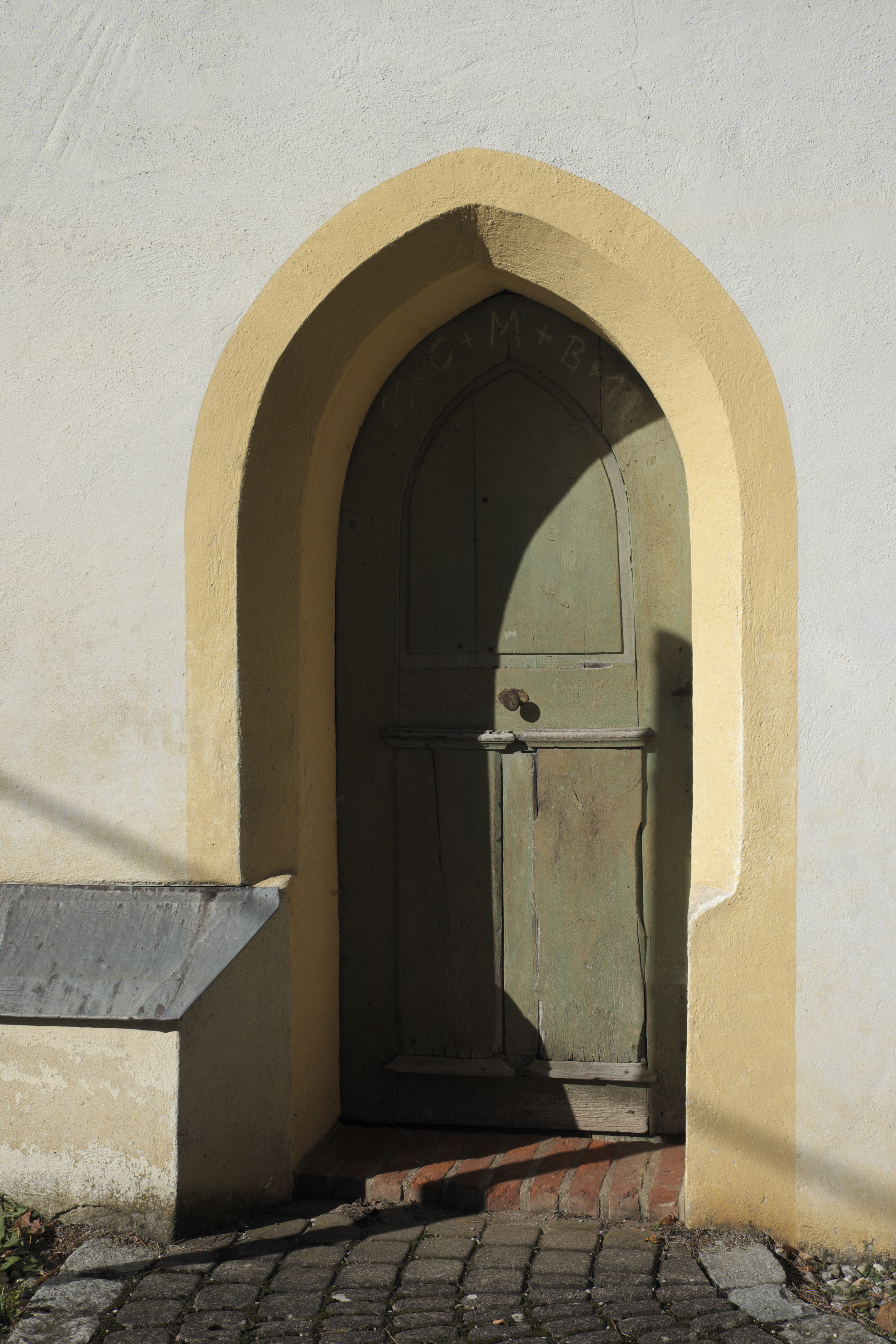 Katholische Kapelle St. Georg in Mauern, einem Ortsteil von Grafrath im Landkreis Fürstenfeldbruck (Bayern/Deutschland), Spitzbogenportal